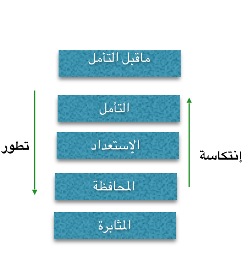 transtheoretical theory، مراحل النموذج